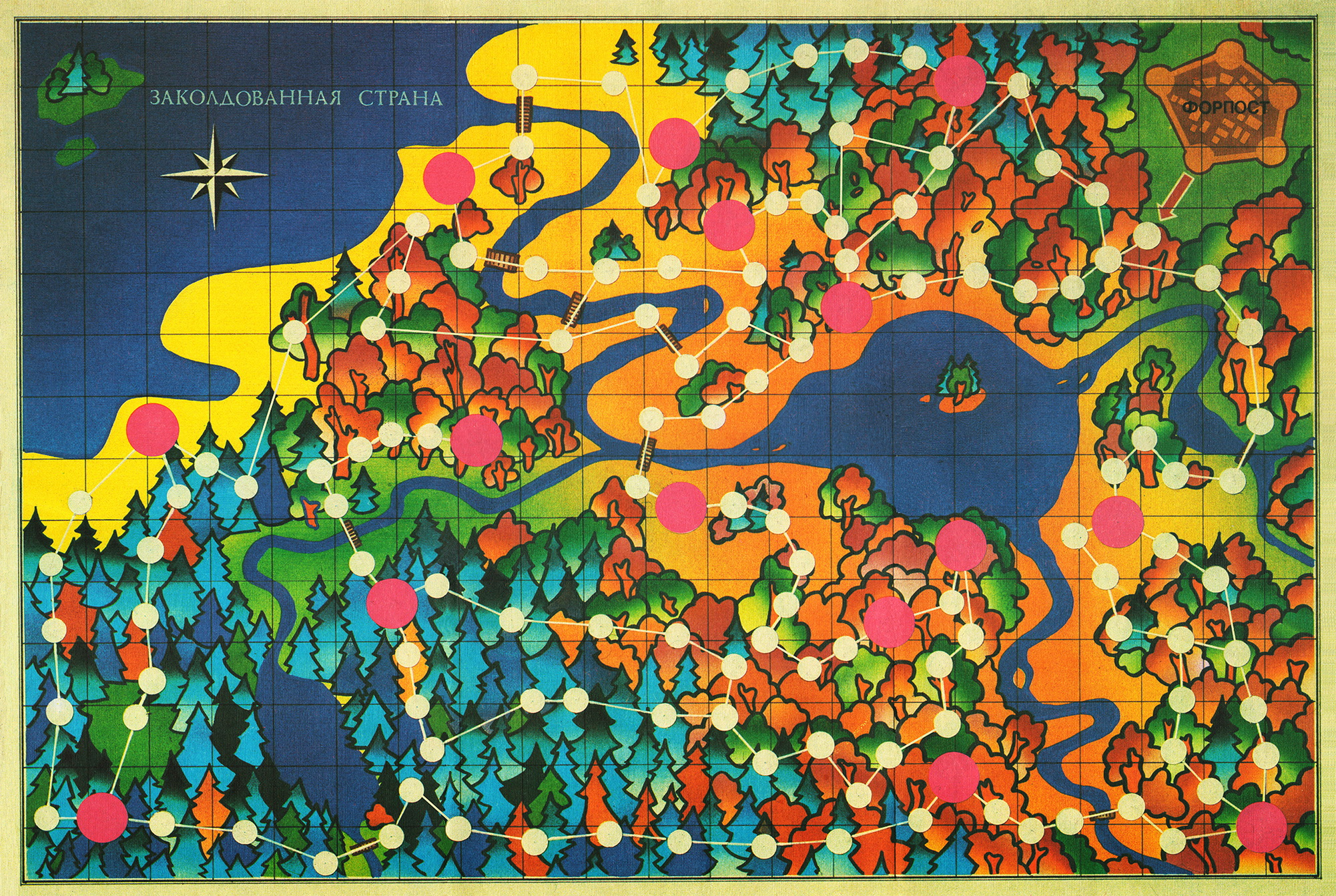 Карта игры Заколдованная страна